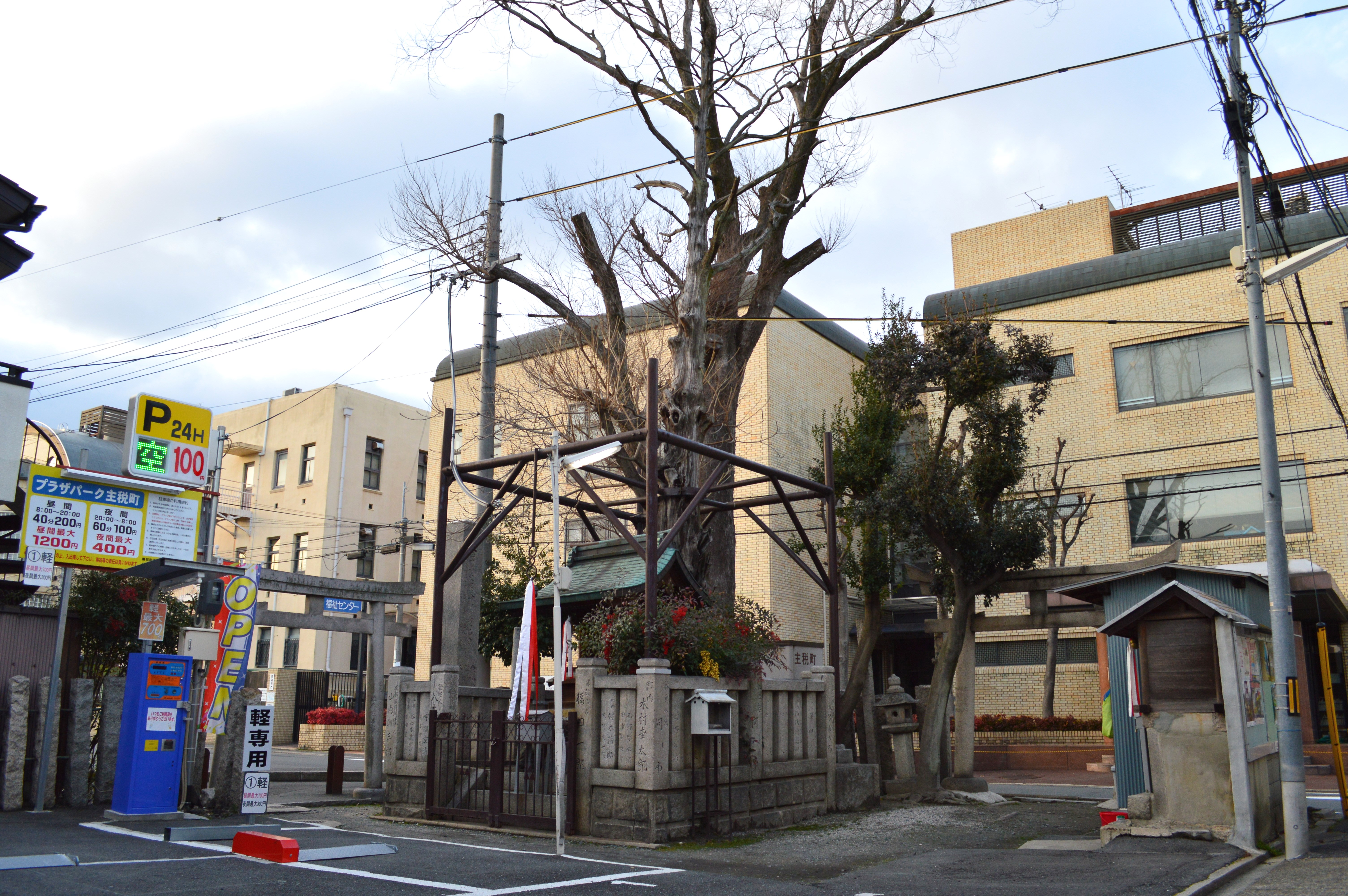 大宮姫命稲荷神社 (宮中大宮売神論社)